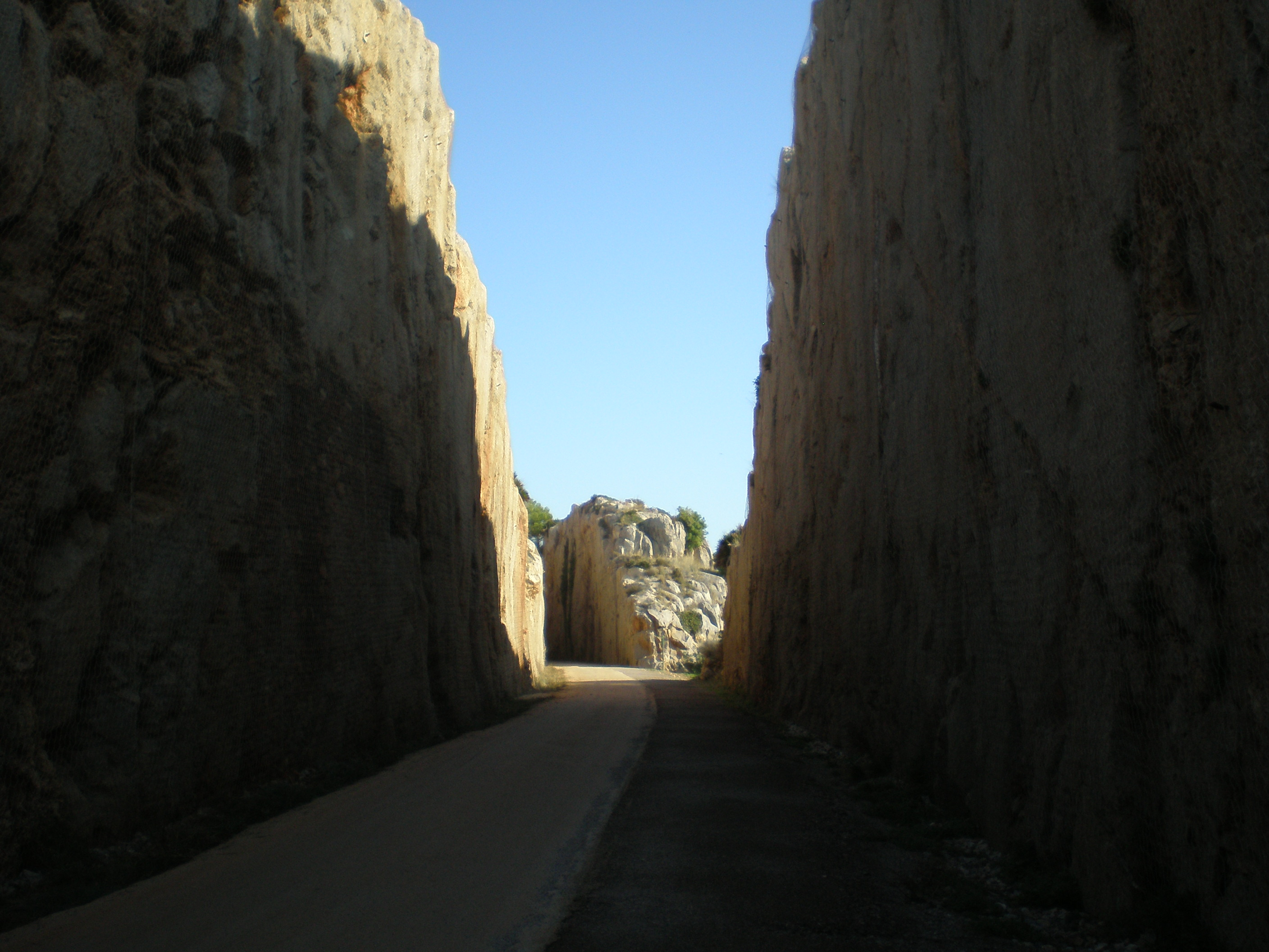 Oropesa del Mar